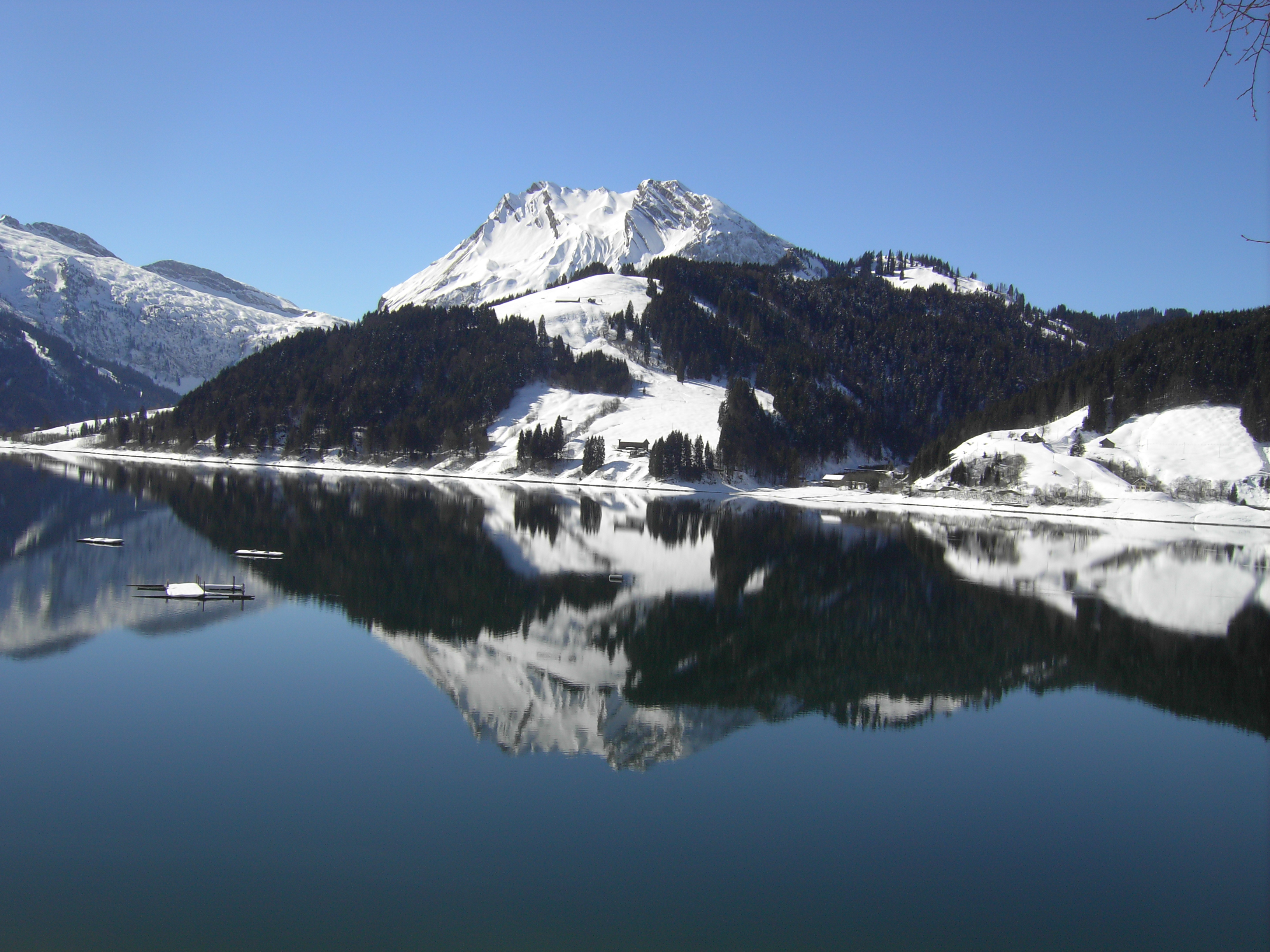 Wägitalersee (Lake Wägital) in Innerthal SZ, Switzerland